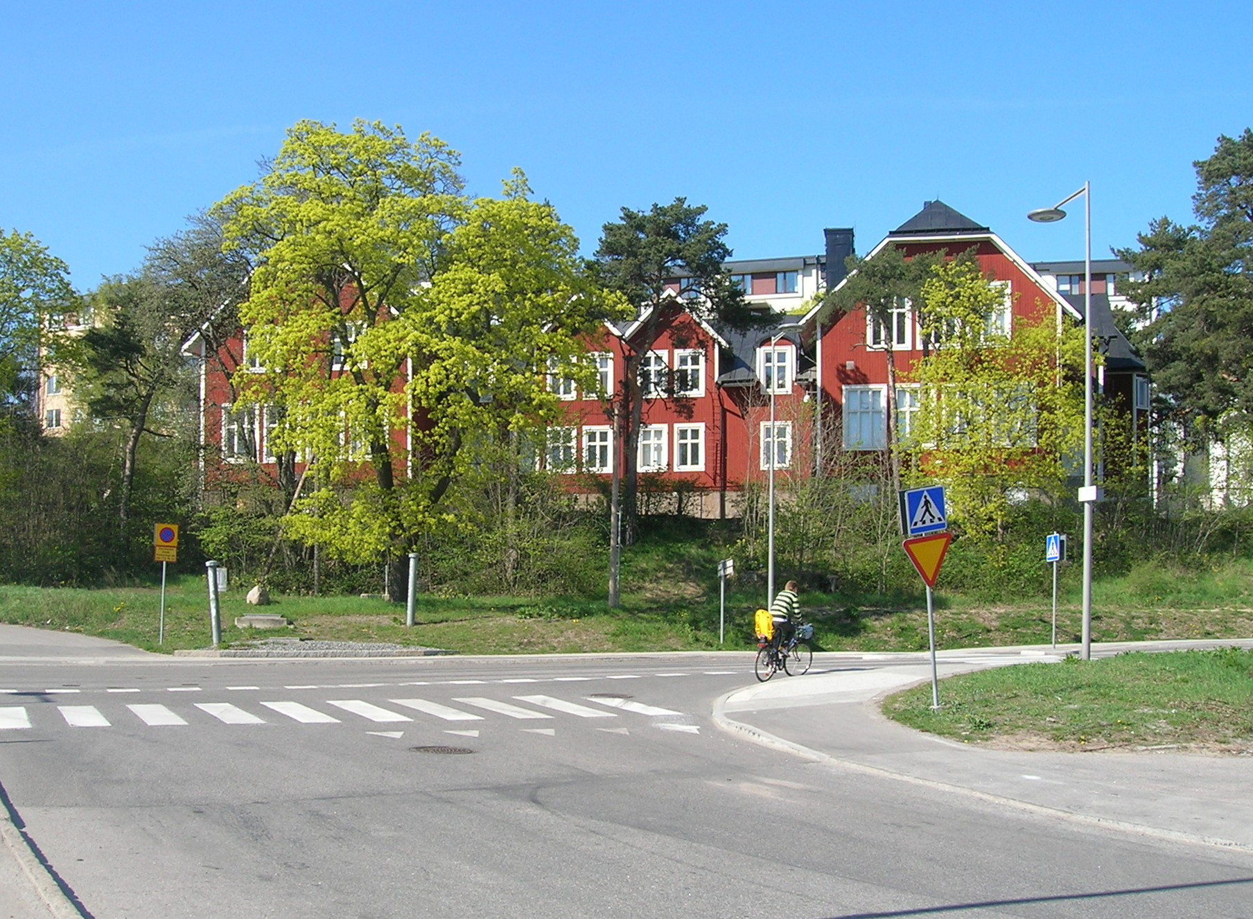 Årsta gamla skola i Liljeholmen, Stockholm. Uppförd 1903